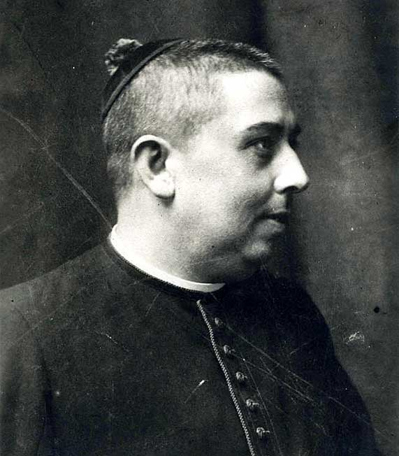 Fotografía de un cuadro que posee la Hermandad de la Soledad de Hinojos Huelva en la sacristía de su capilla.